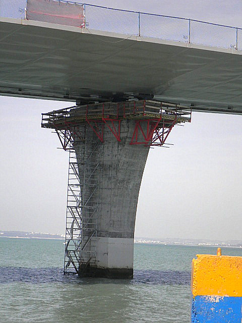 Una pila del Puente de la Constitución de 1812, en Cádiz.